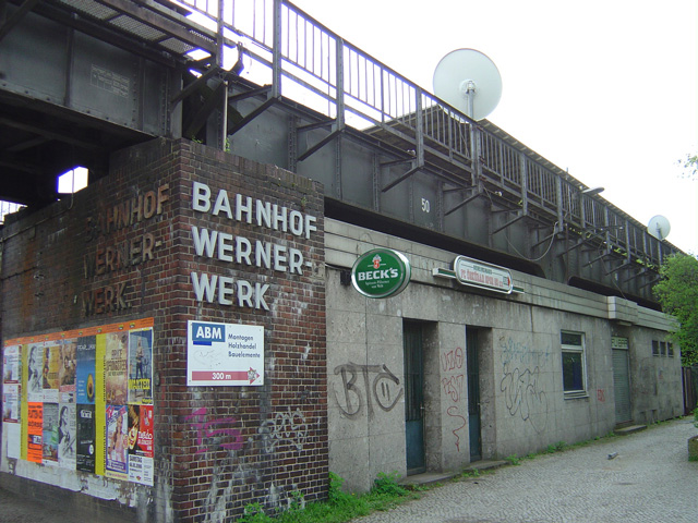 The former S-Bahn Station Wernerwerk, Siemensstadt, Berlin, Germany